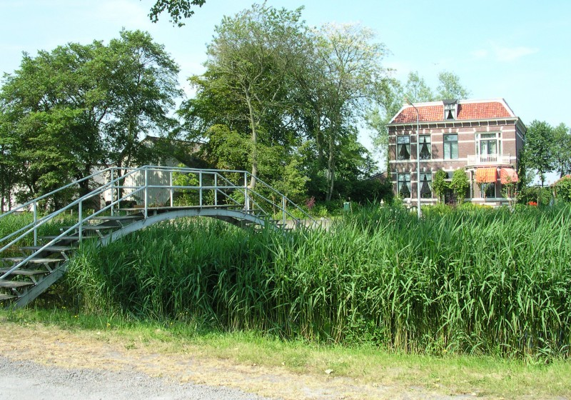 Eén van de huizen aan de Molenvaart, in de Gelderse Buurt, Anna Paulowna. One of the houses at the Molenvaart in the hamlet Gelderse Buurt in Anna Paulowna.